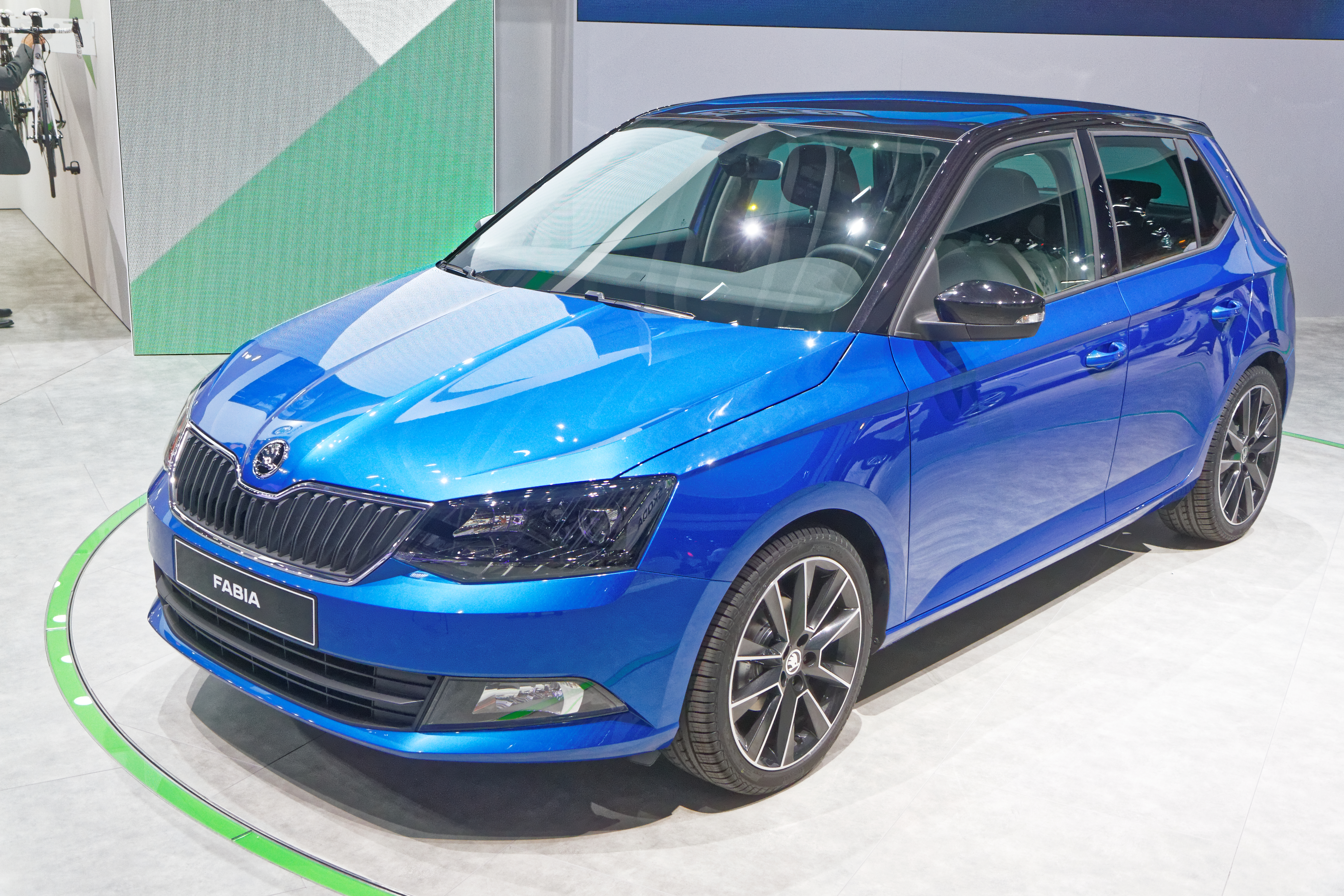 Une Škoda Fabia présentée lors du mondial de l'automobile de Paris 2014.